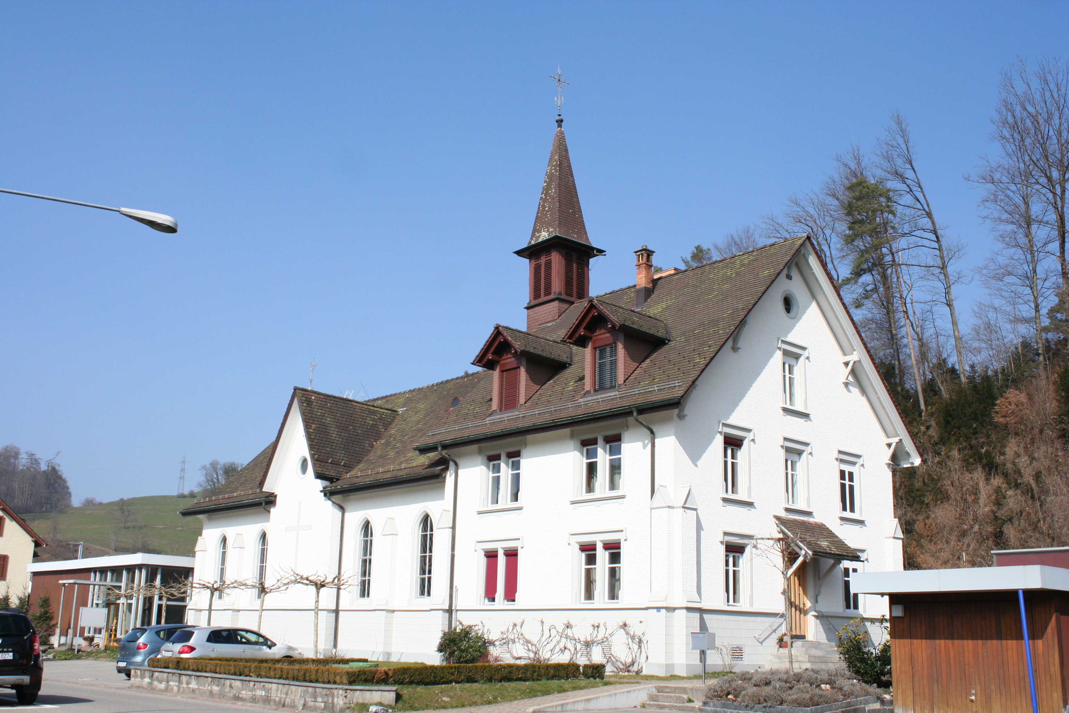 Römisch-katholische Pfarrkirche St. Antonius Kollbrunn, Ansicht von Nordwesten